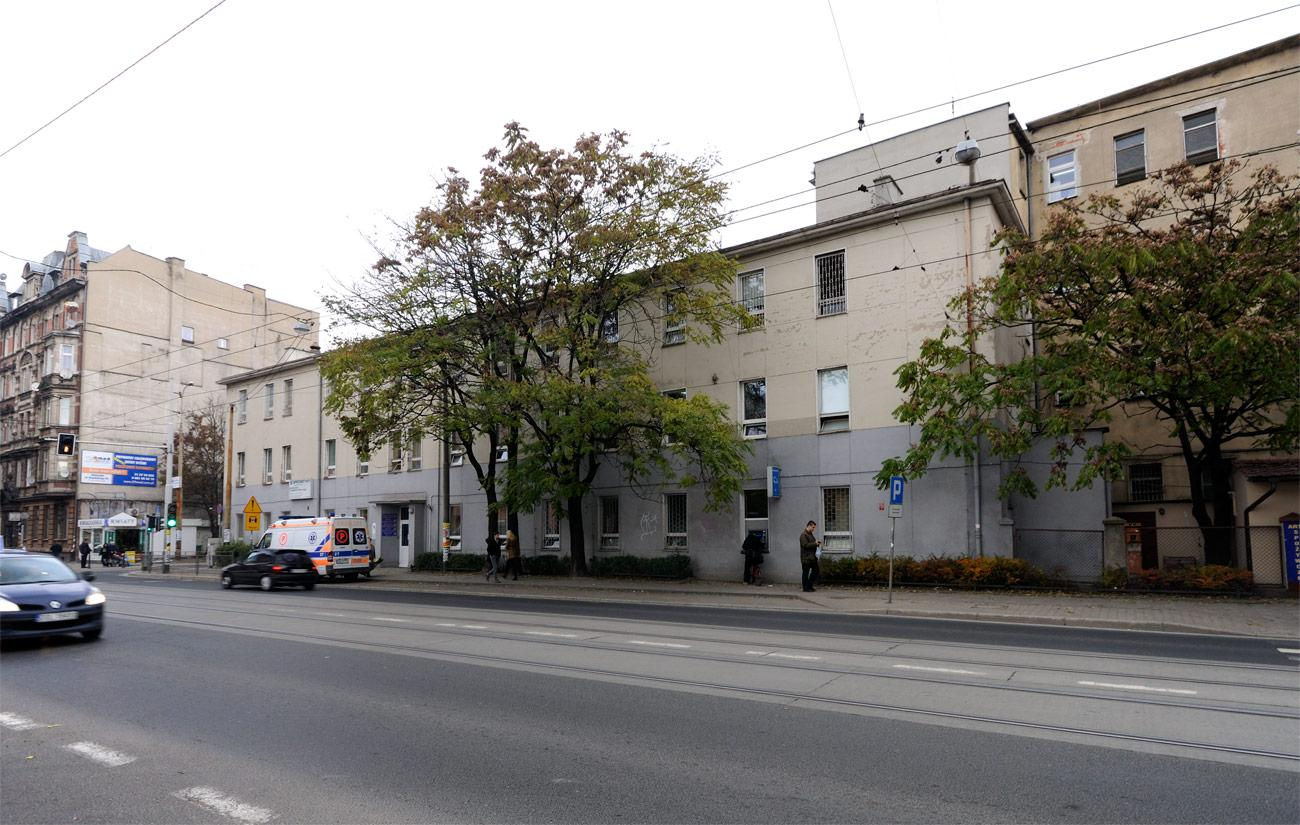 Budynek "G" szpitala im. Marciniaka.